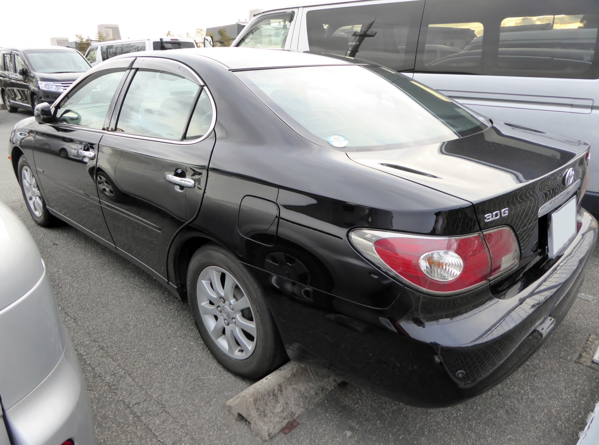 MCV30型トヨタ・ウィンダム3.0Gをリアから撮影。